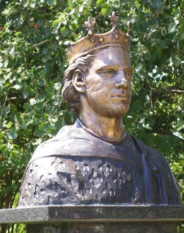 Szent Imre herceg szobra (Lantos Györgyi alkotása) a soltszentimrei Hősök terén.